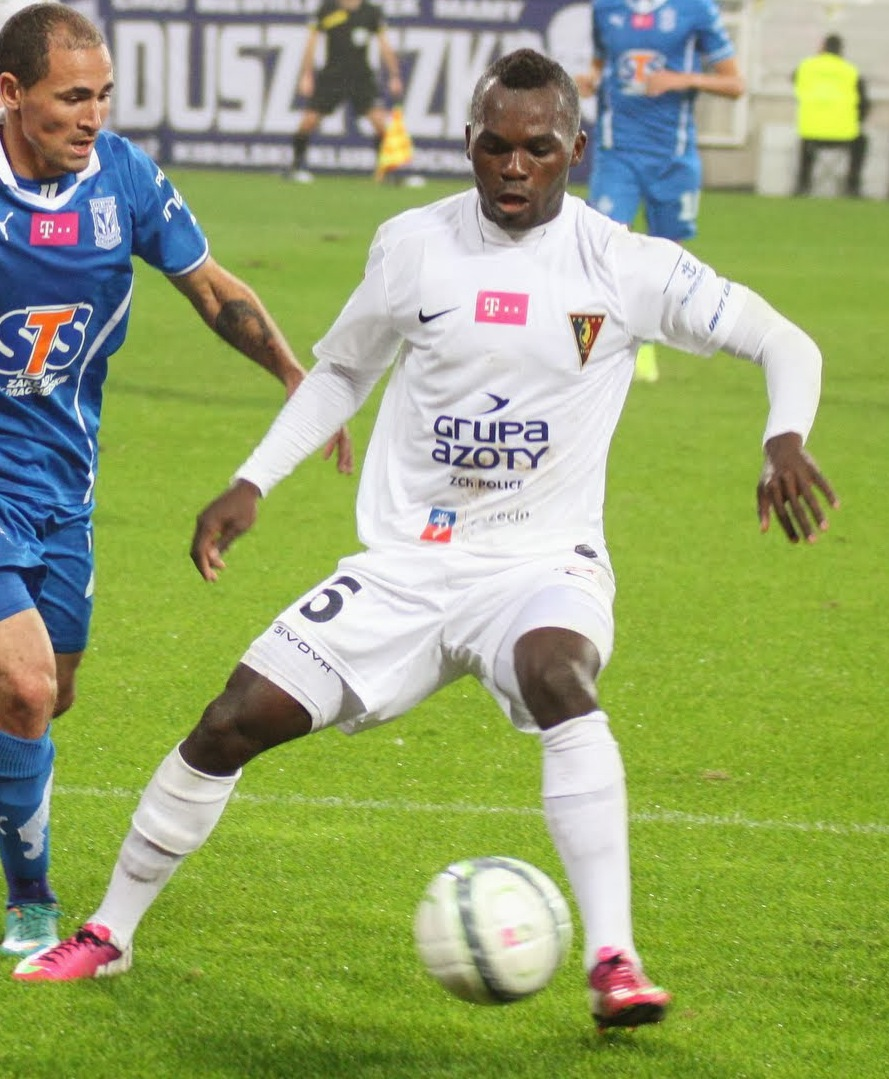 Hervé Tchami w barwach Pogoni Szczecin